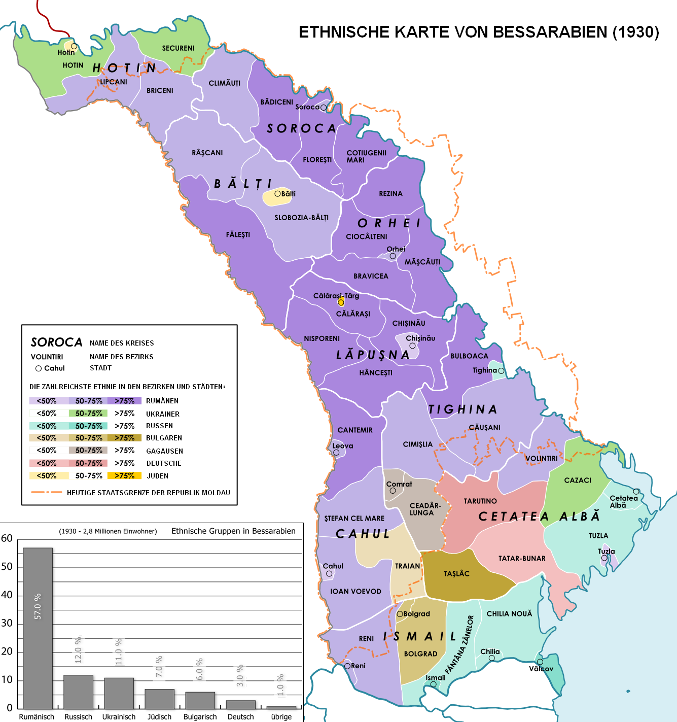 Ethnische Karte Bessarabiens, gemäß den Volkszählungsergebnissen von 1930.